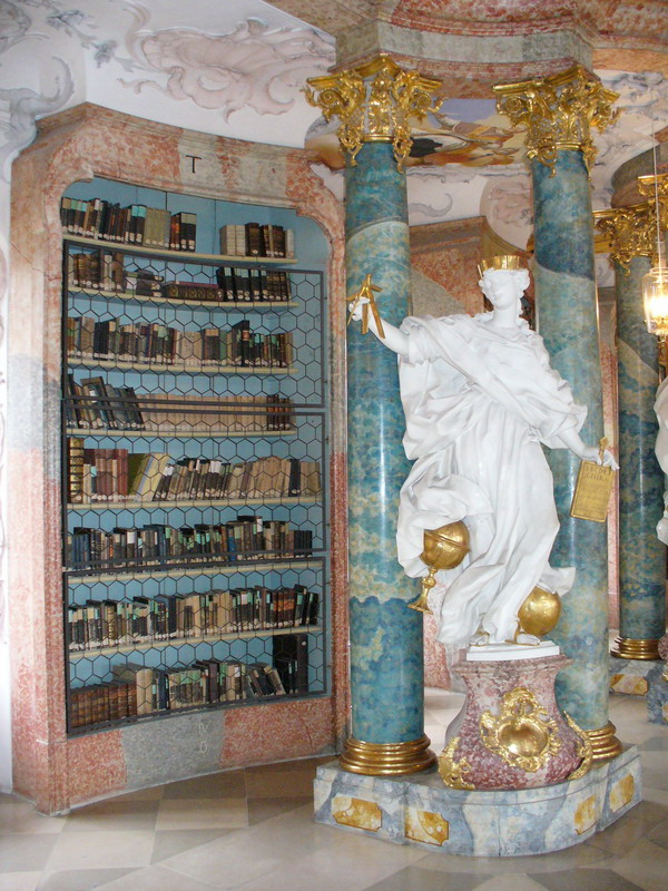 Bildbeschreibung: Ulm-Wiblingen Bibiliothekssaal Bücherschrank Quelle: selbst fotografiert Fotograf : User:Enslin Datum: 9-april-2006 Sonstiges